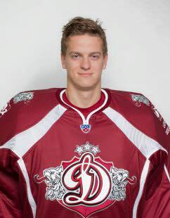 Team photo